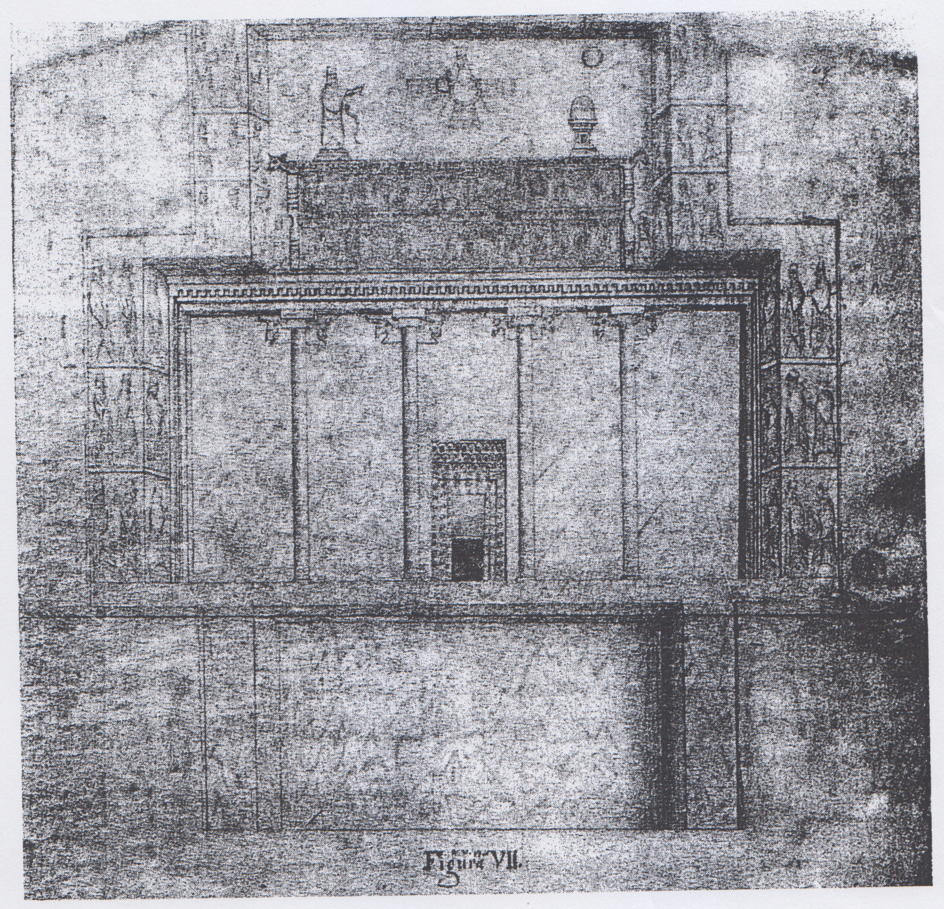 تصویر خطی مقبره خشایارشا در نقش رستم (5232/49)